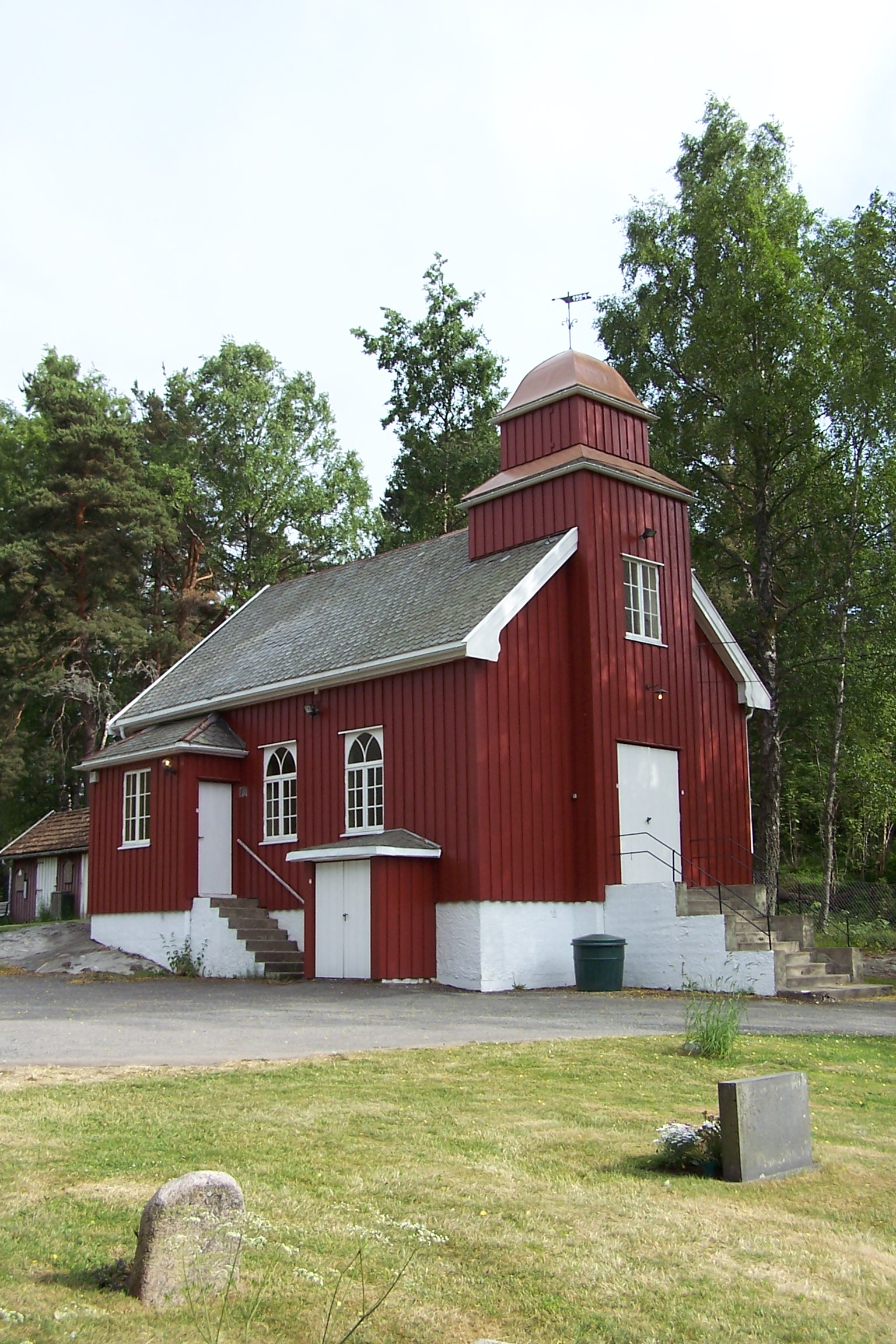 Son, Norway: Strømbråten chapel